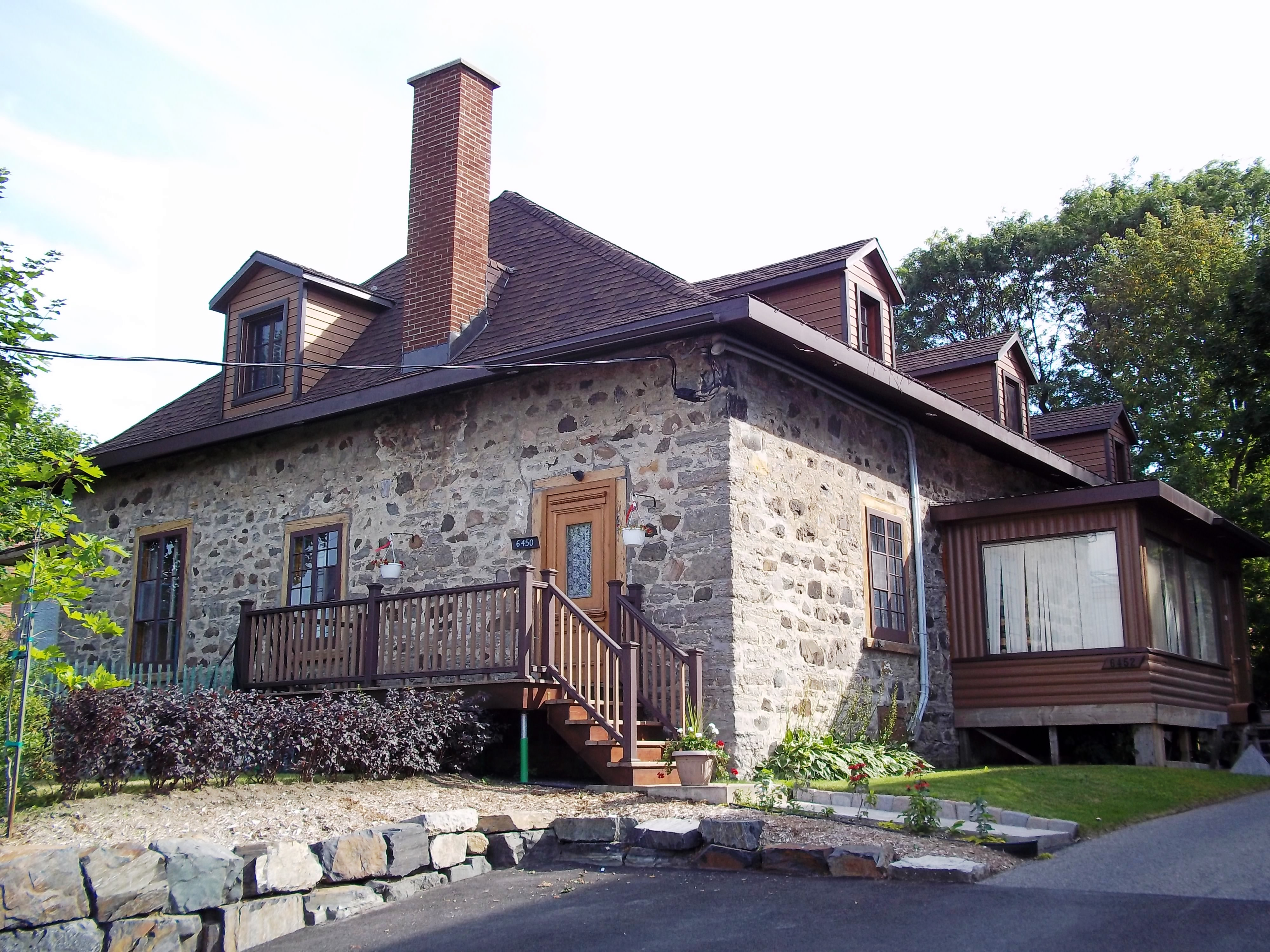 Maison Longpré, 6450, 35e avenue, Montréal